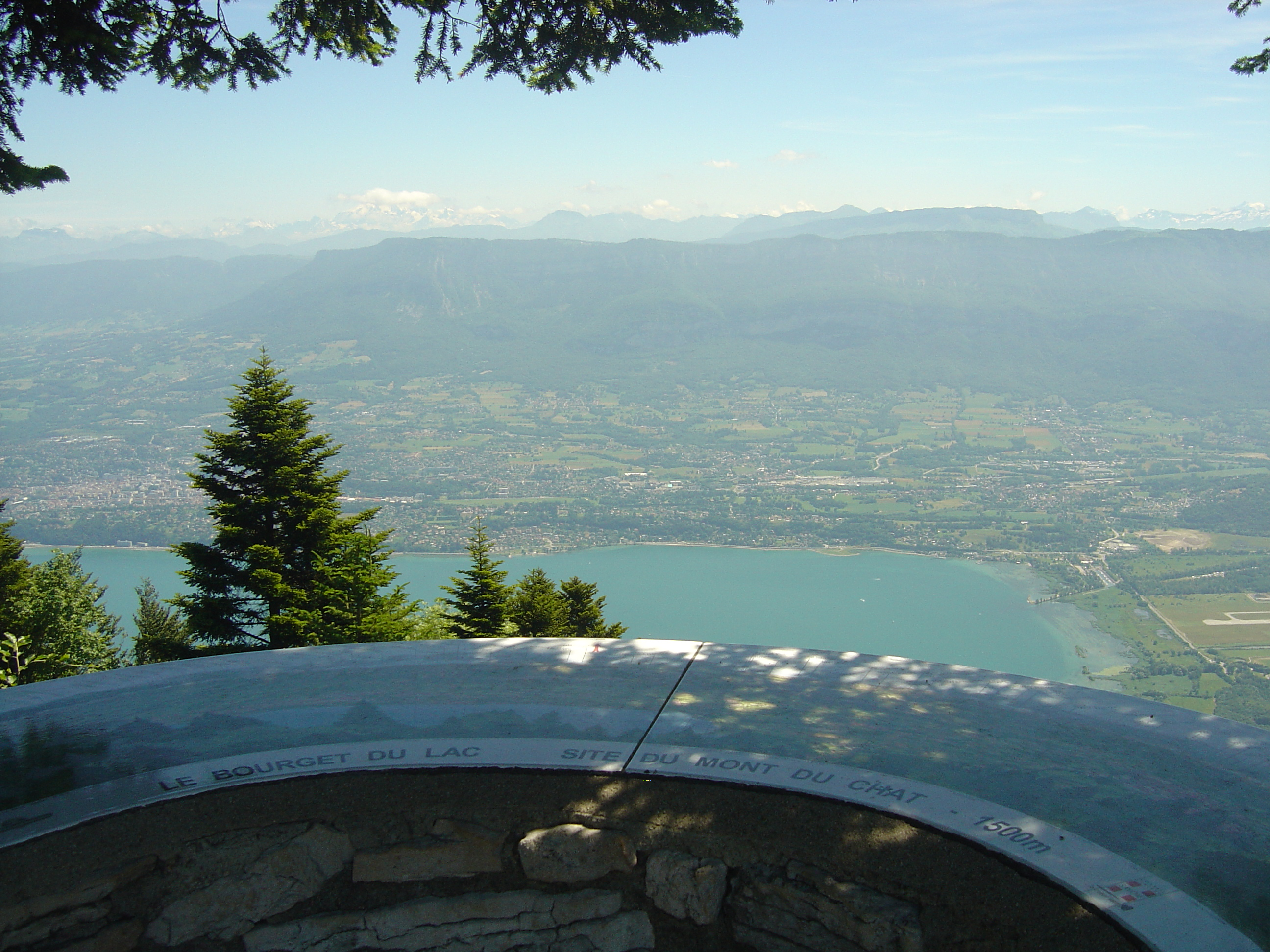 Table d'orientation au sommet du Mont du Chat (1504m). On peut y voir le lac du Bourget, Aix-les-Bains ainsi que le mont Blanc ici dans les nuages.